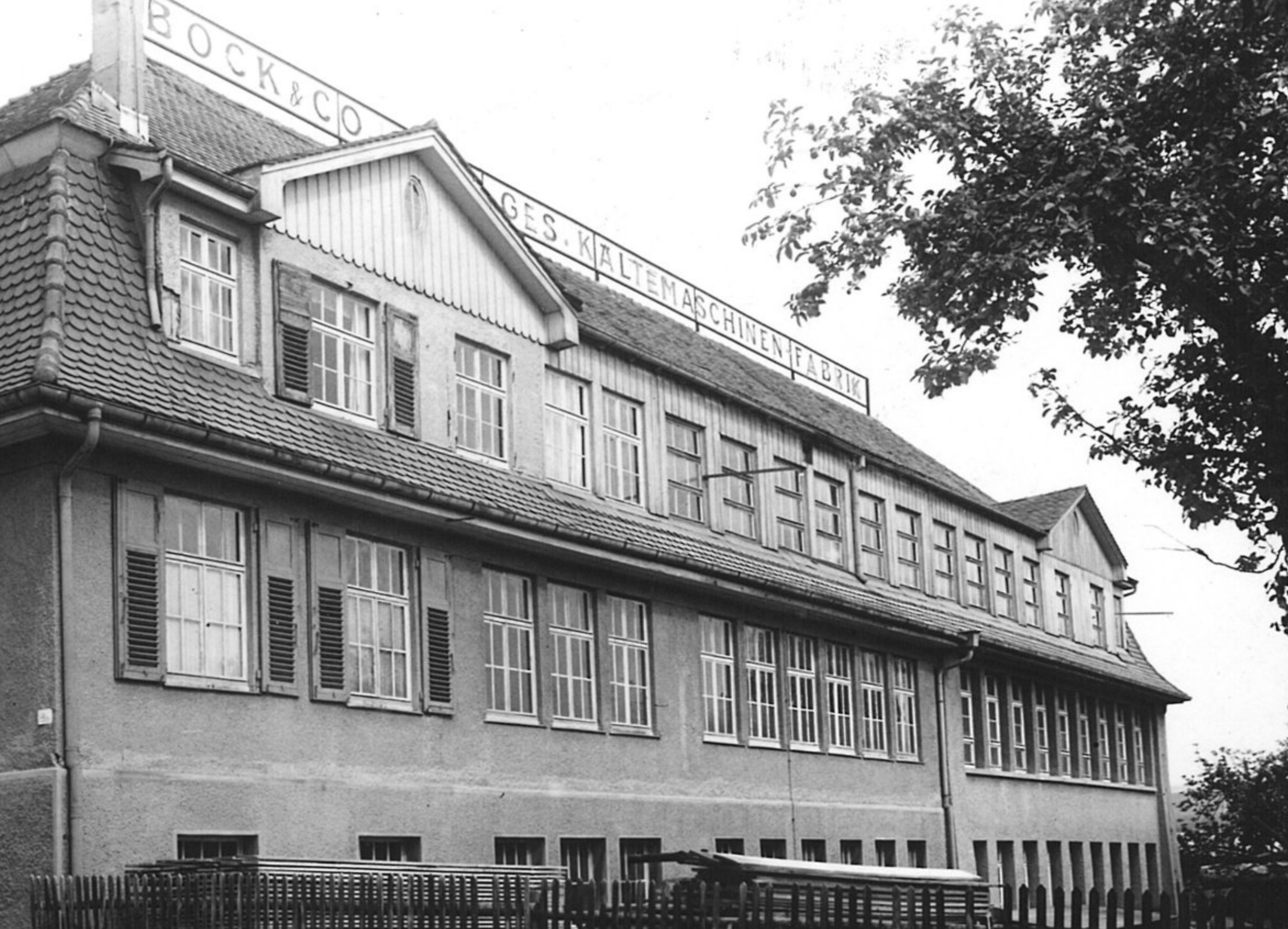 Die Kißlingstraße 20 in Nürtingen war bis 1993 der Hauptsitz von Bock.